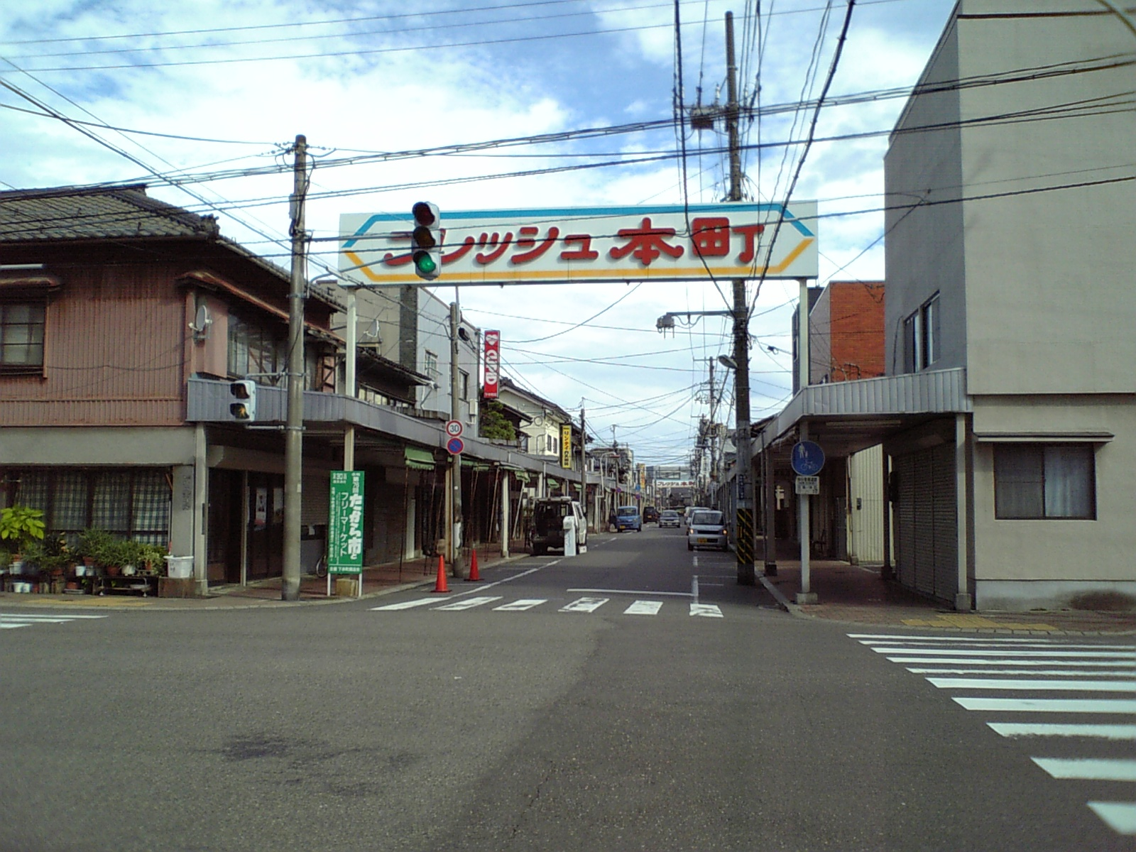 フレッシュ本町。